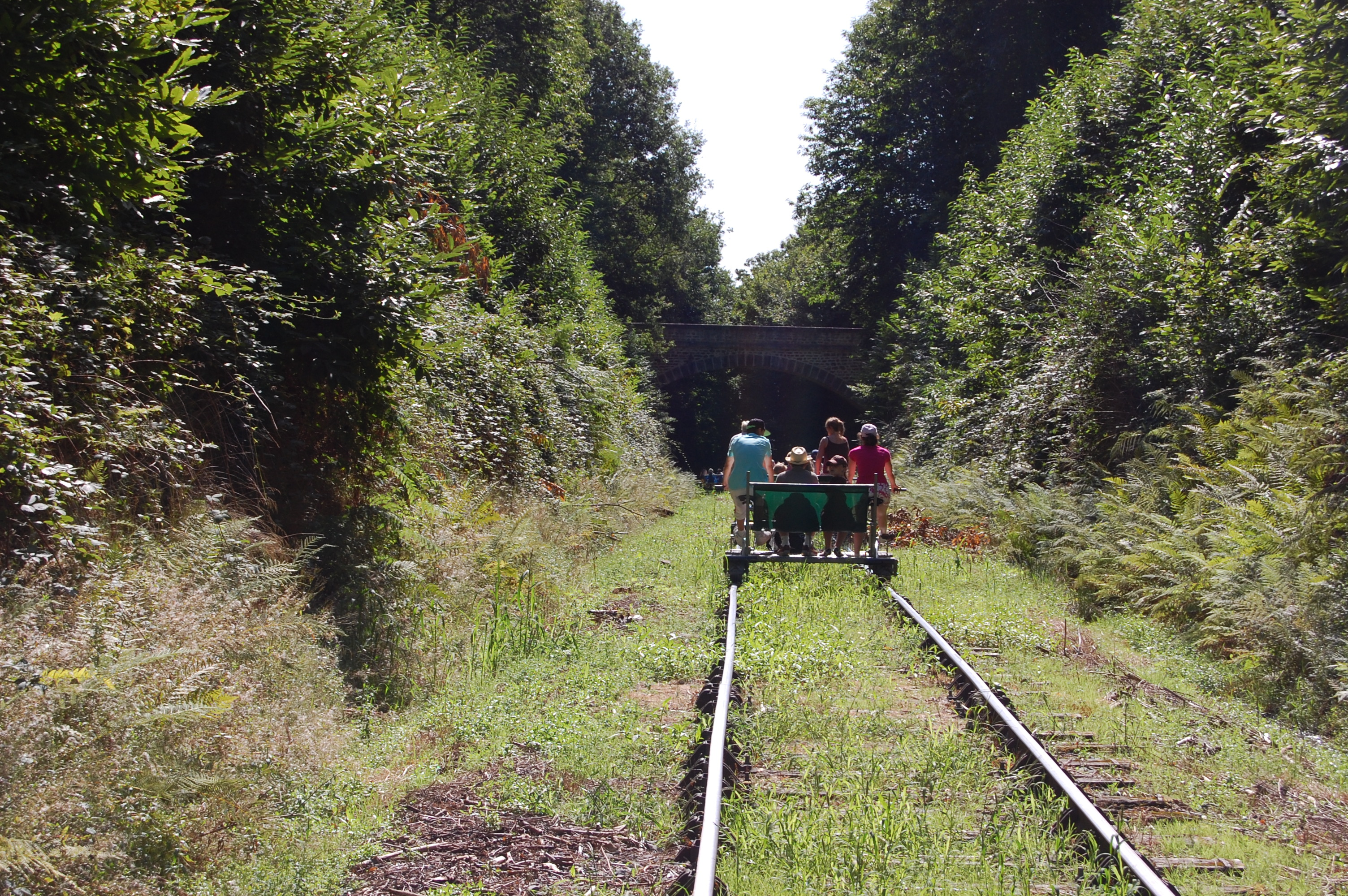 Le pont de Contentigne sur le parcours du vélorail de Bussière à Châlus